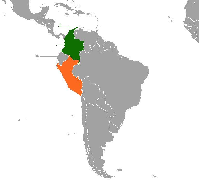 Colombia y Perú.